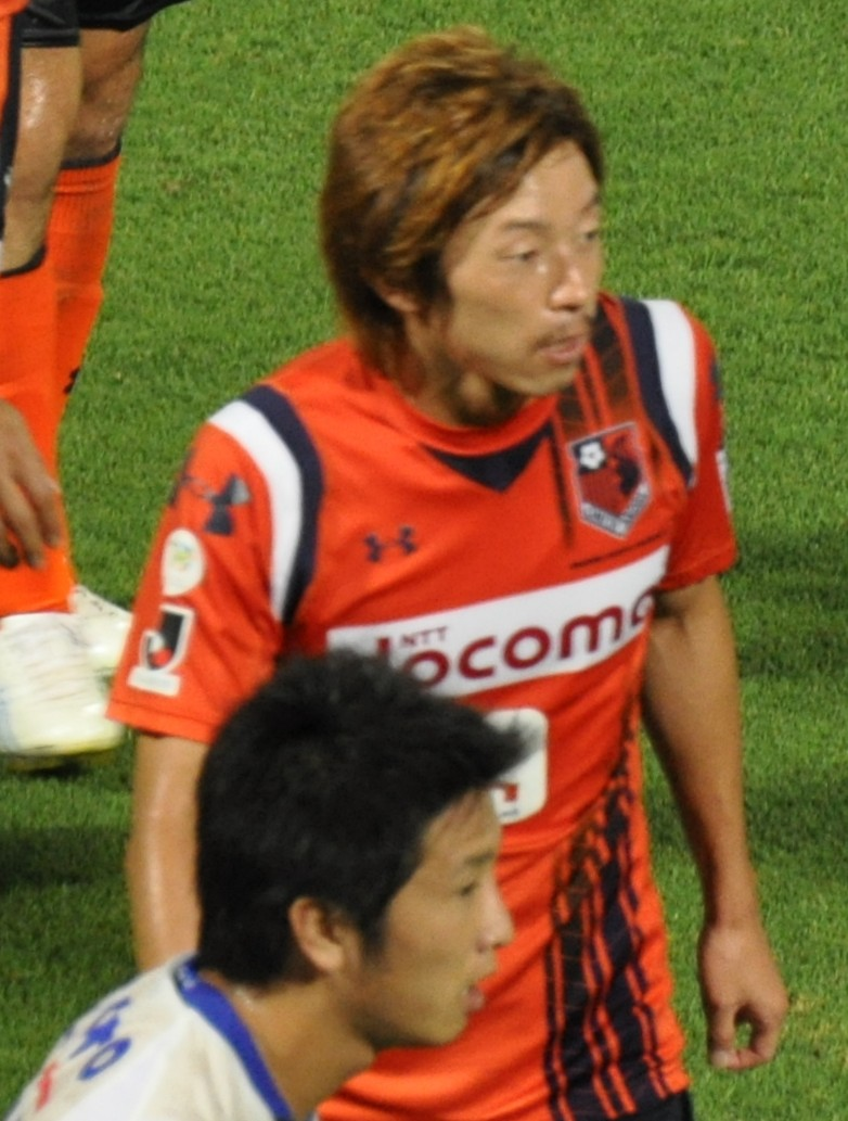 Naoki Ishihara, cropped from 2011.07.10 Omiya Ardija 2-3 Gamba Osaka_161